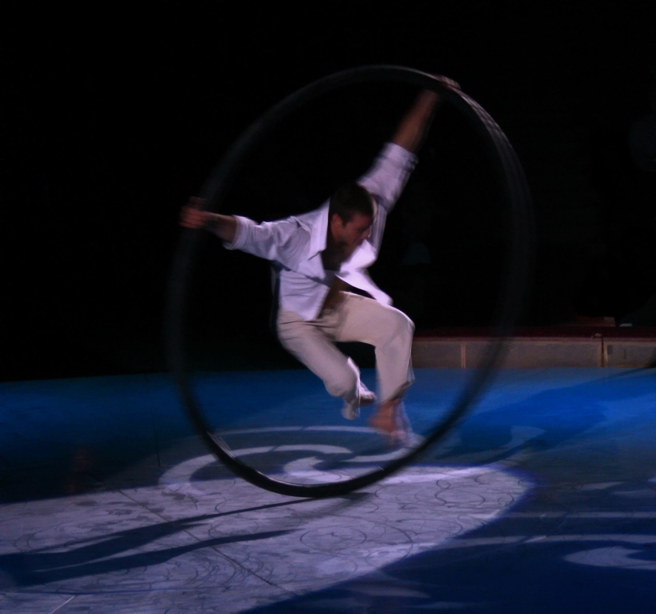 Hugo Noel aus Kanada am Cyr Wheel